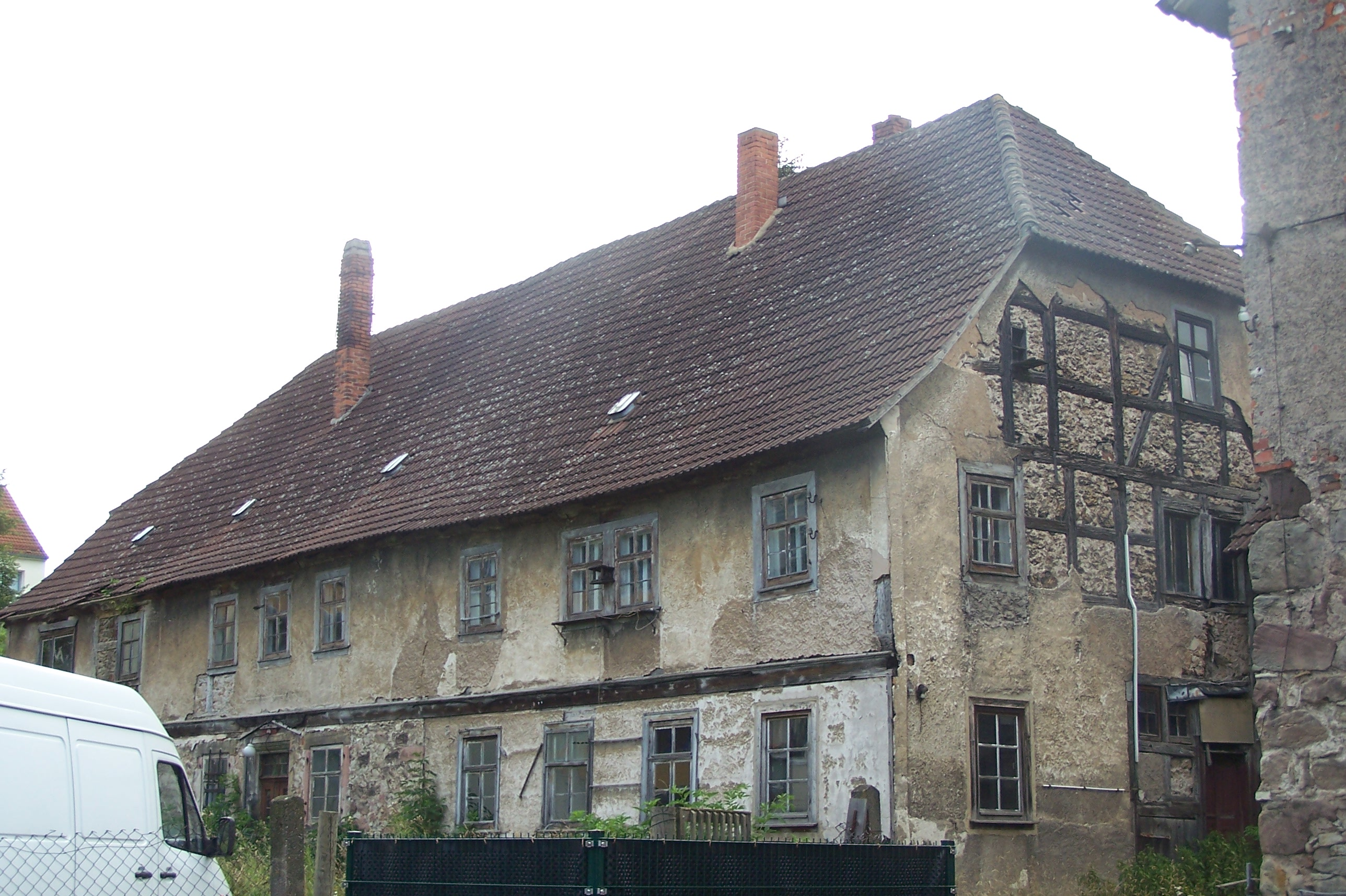 GTH Mechterstädt, Ostflügel 01